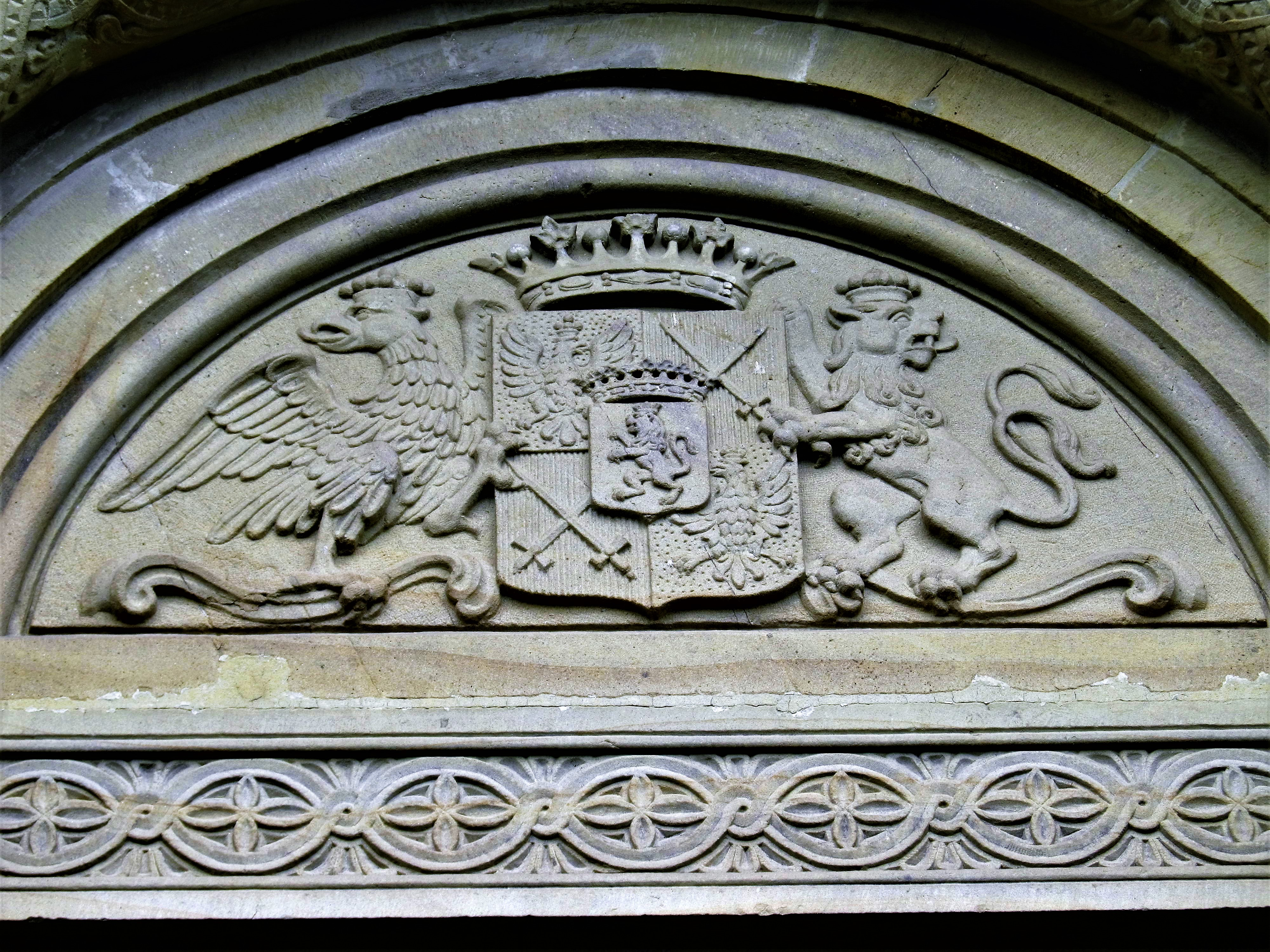 Erb rodu Seilern-Aspang na rodové hrobce ve Štípě